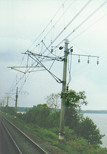 Fervoja trako kun supertraka kontakta linio apud stacio Redkino en Tverja provinco, Rusio, 2002. Parto de la kontakta linio flankiĝas kaj je la sekva fosto estas peziloj. Mi, aŭtoro de la bildo, permesas al ĉiuj uzi ĝin kun ĉi tiuj kondiĉoj: La fonta bildo de ĉi tiu bildo estas ankaŭ en mia propra retpaĝaro [1]